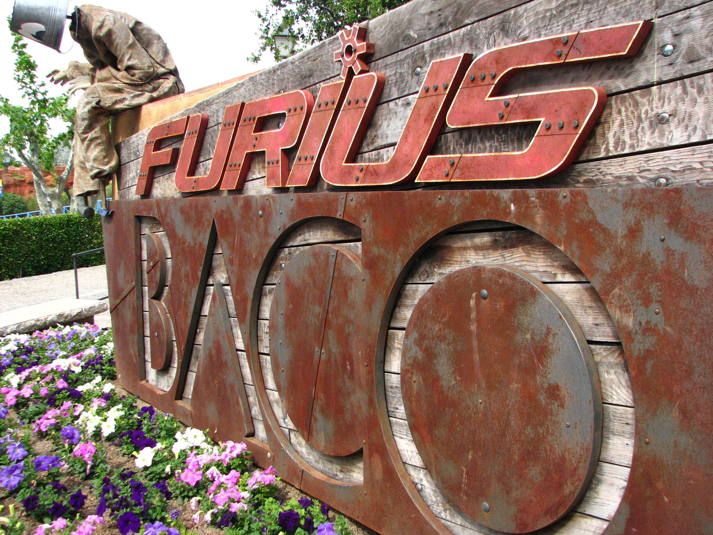 PortAventura Park